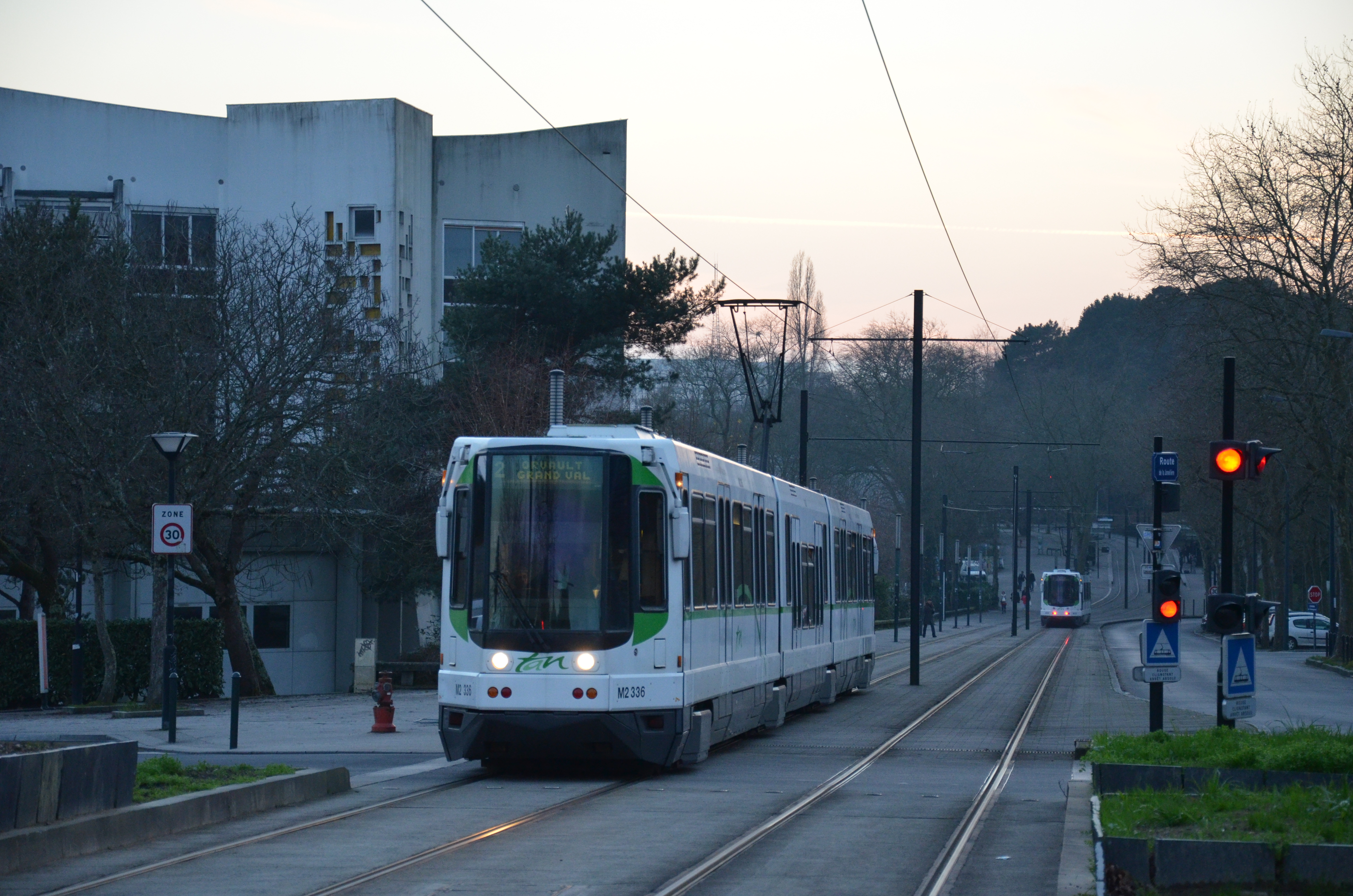 Alsthom TFS n°336 sur la ligne 2 du tramway Nantais, près de la station École Centrale Audencia.